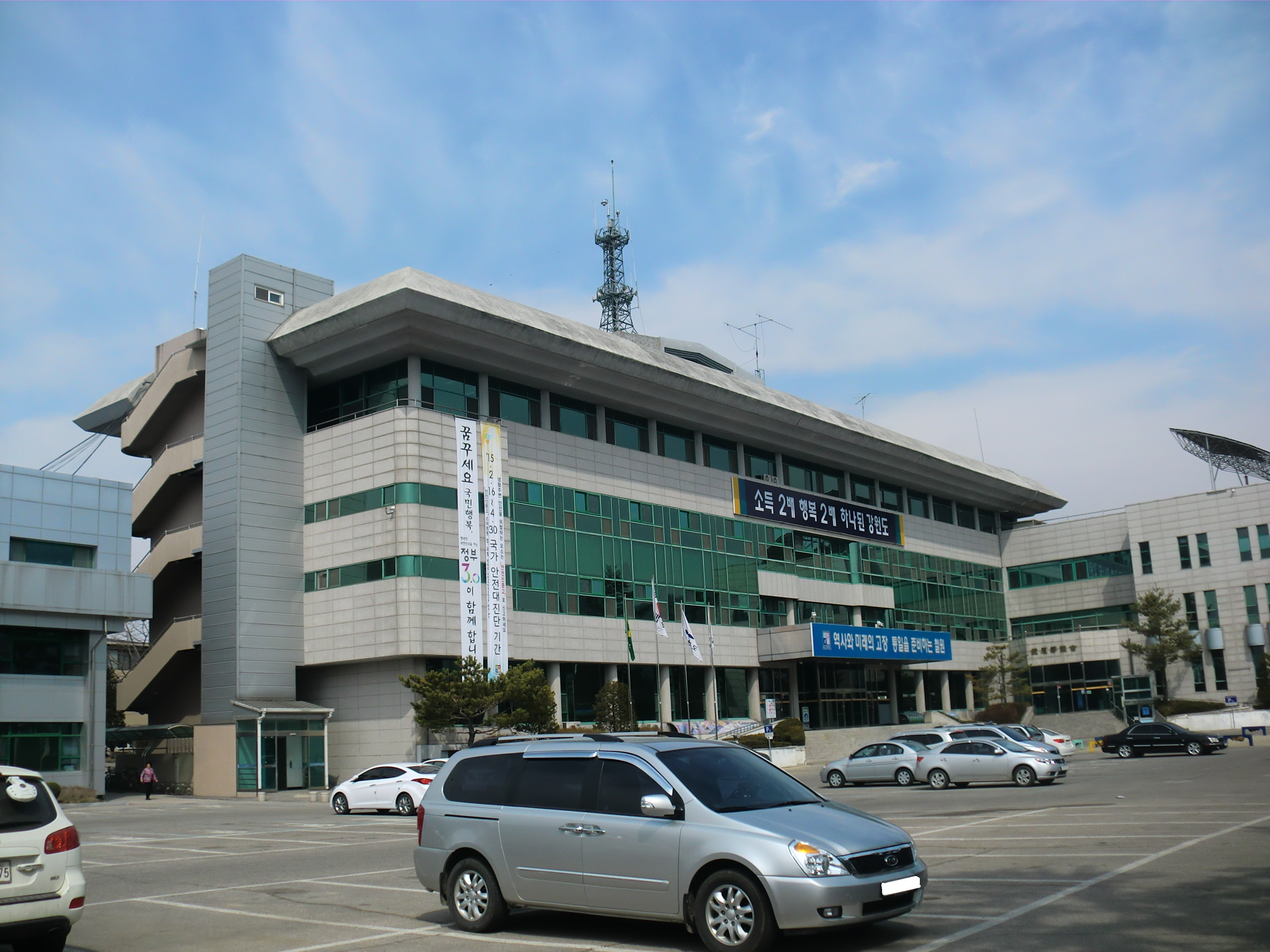 강원도 철원군에 있는 철원군청